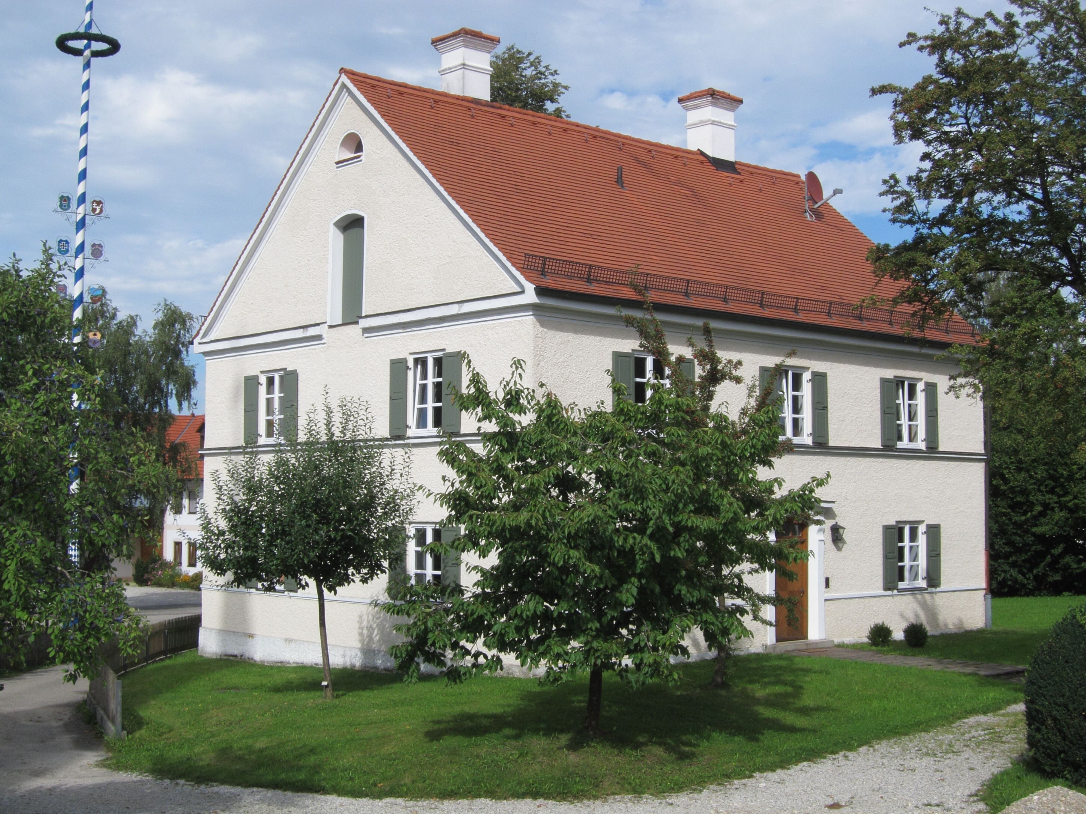 Rappoltskirchen; ehem. Pfarrhaus, zweigeschossiger Satteldachbau mit Traufgesims, erbaut 1828.